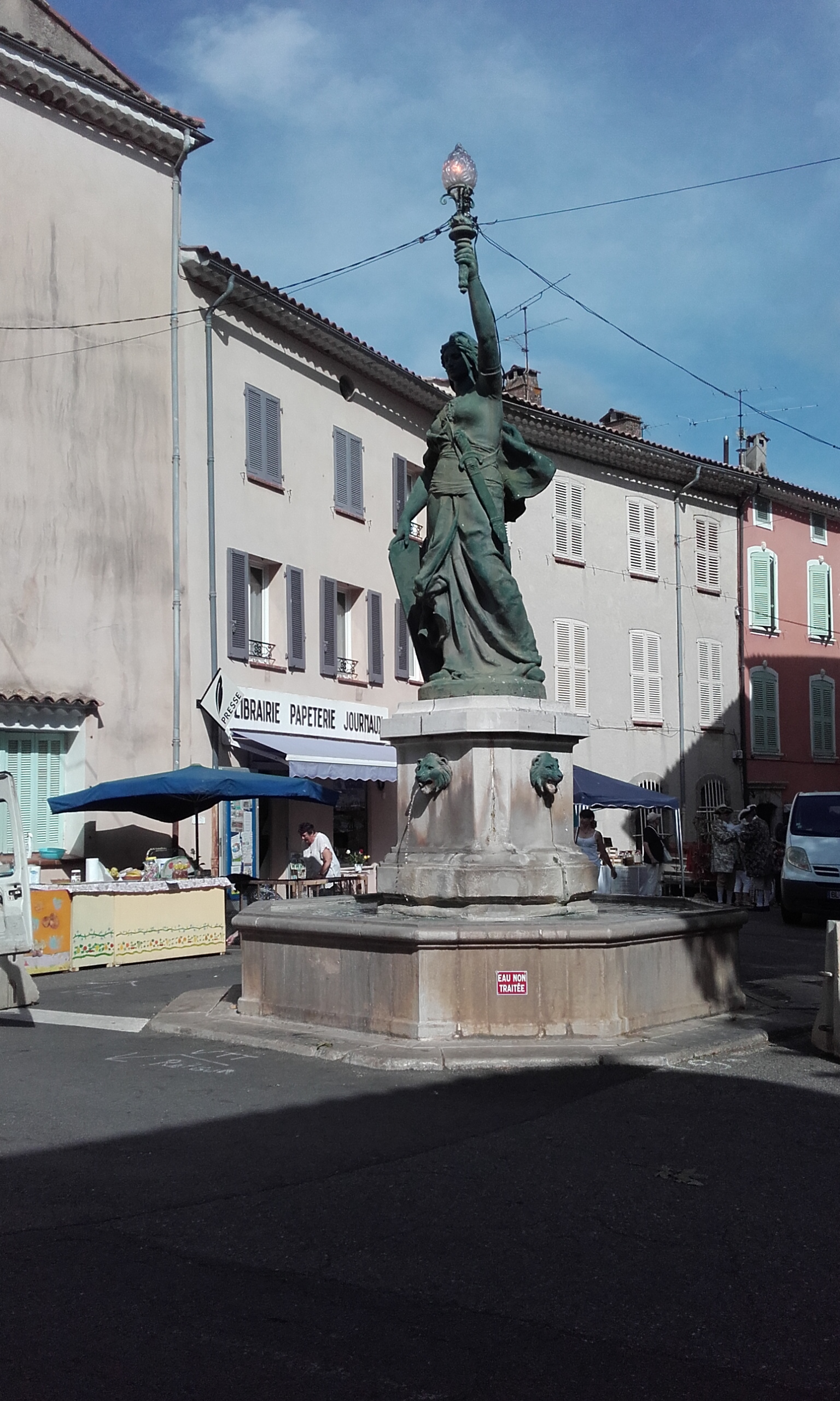 Var, Besse-sur-Issole. Fontaine monumentale, monument (monument commémoratif), du centenaire de la république française à la mémoire de la république. Monument avec sa fontaine, inaugurés le 20-09-1891 par Alexandre Souleyet, ancien maire